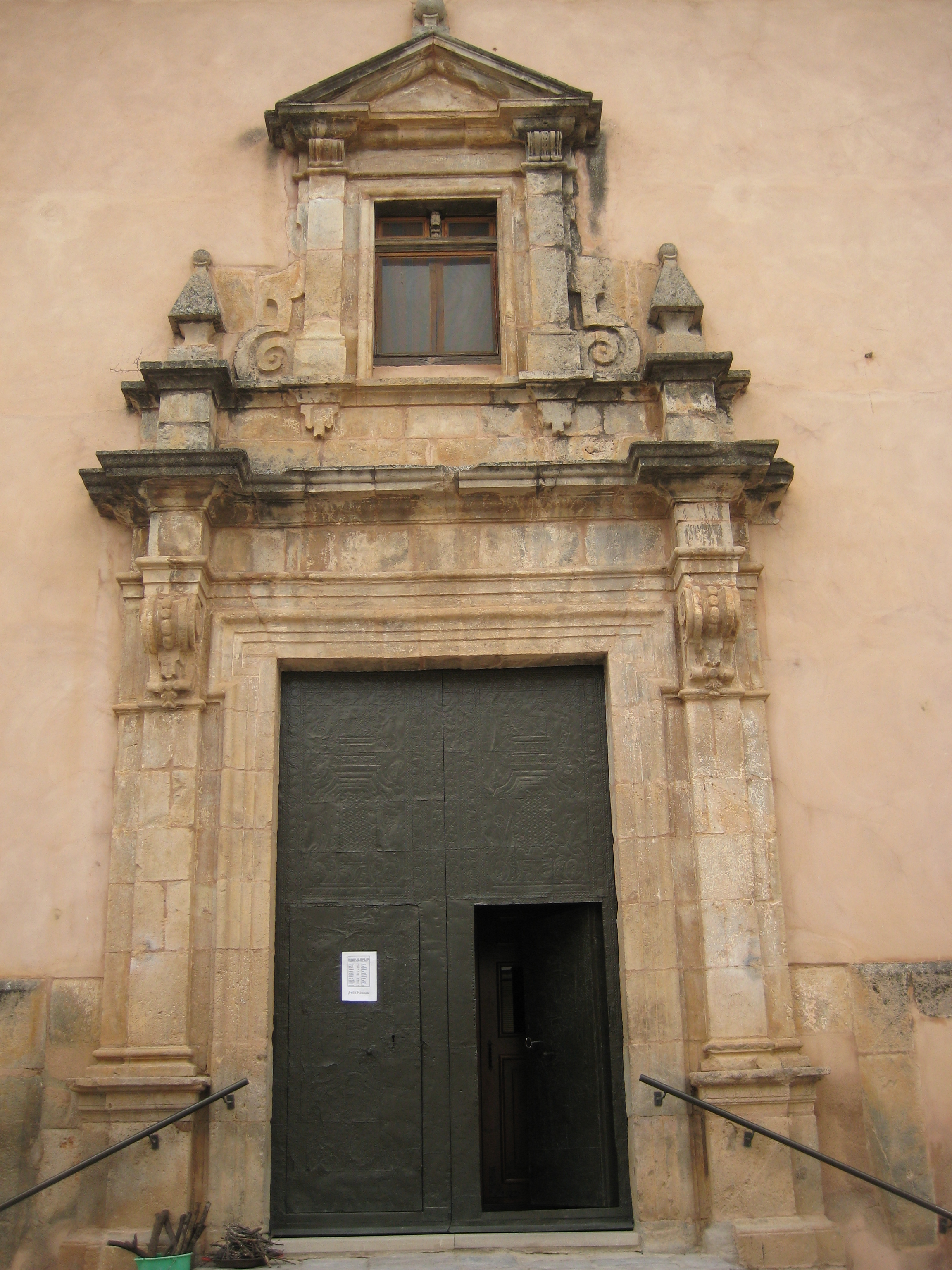 Portada de l'església de Sant Joan Baptista d'Espadella (Alt Millars)